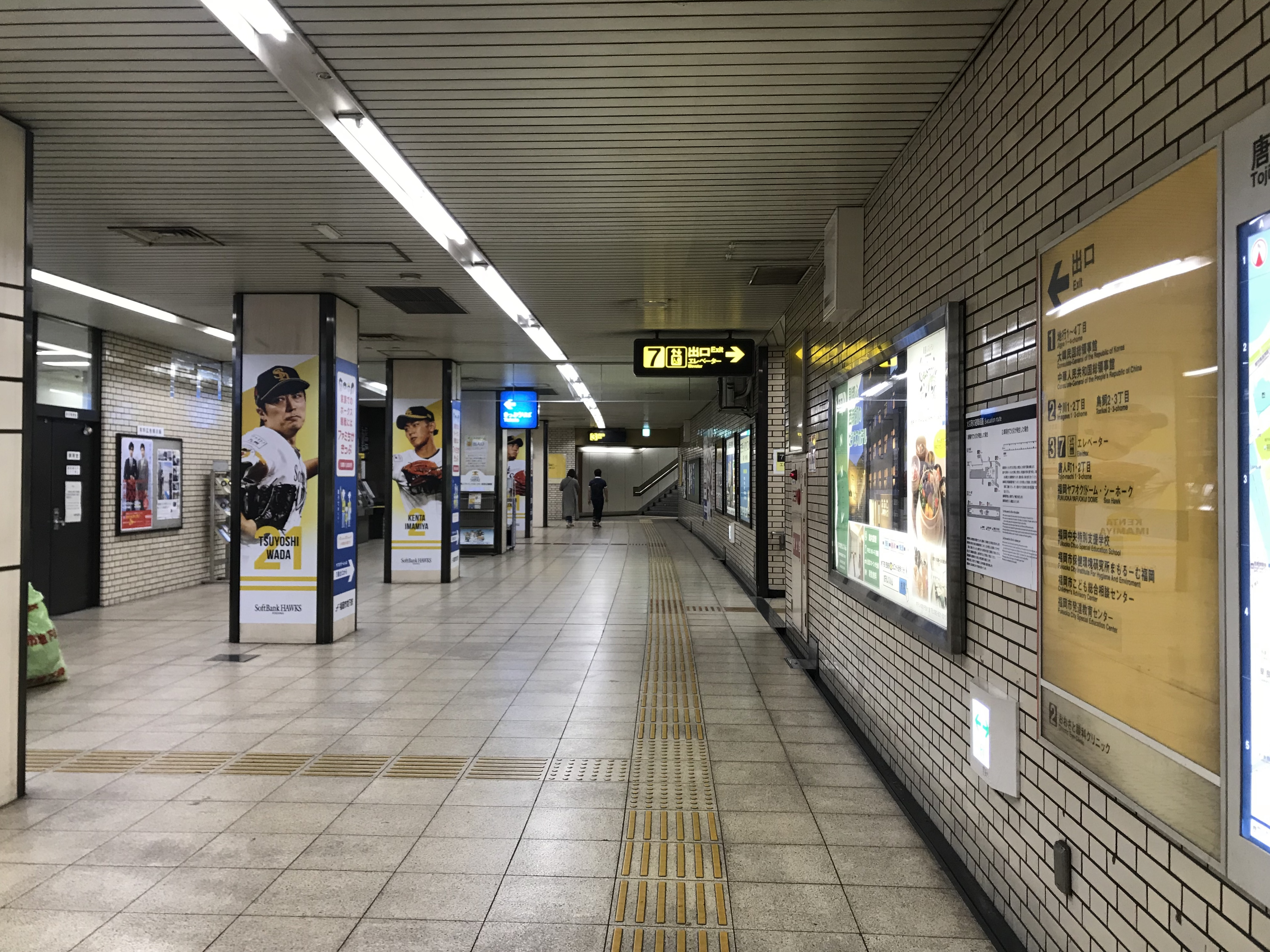 唐人町駅のコンコース